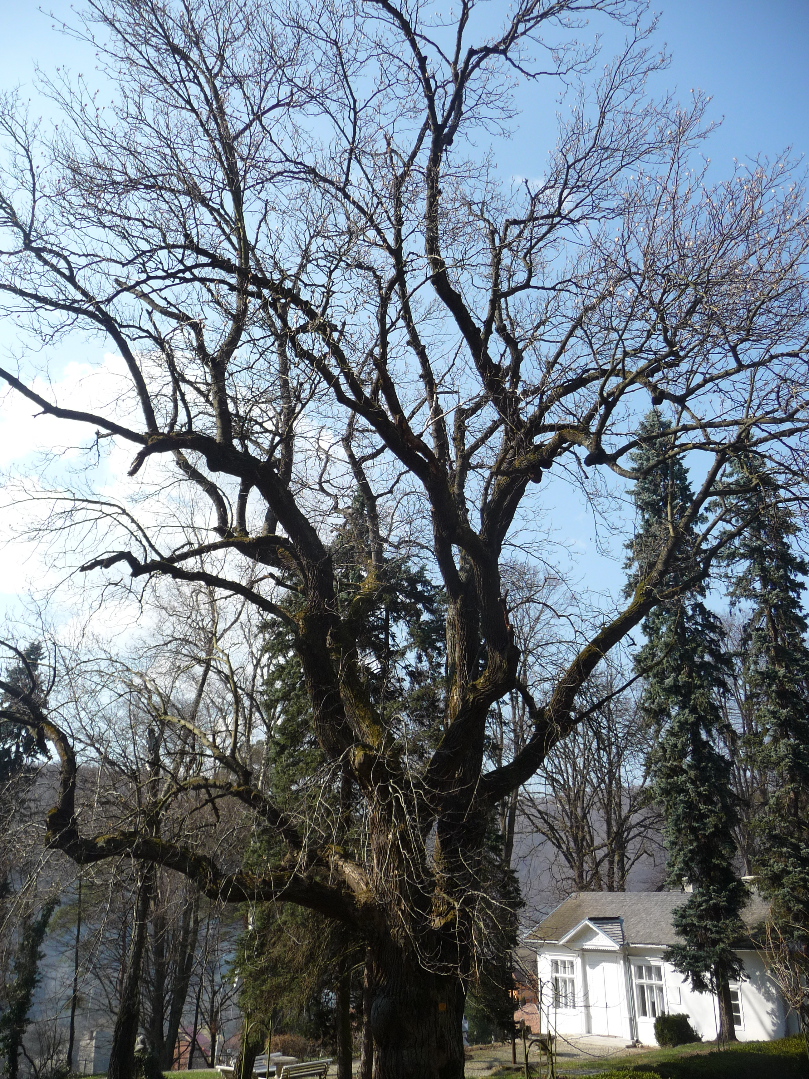 Amerikai tulipánfa (Liriodendron tulipifera) Csucsán, 180 éves